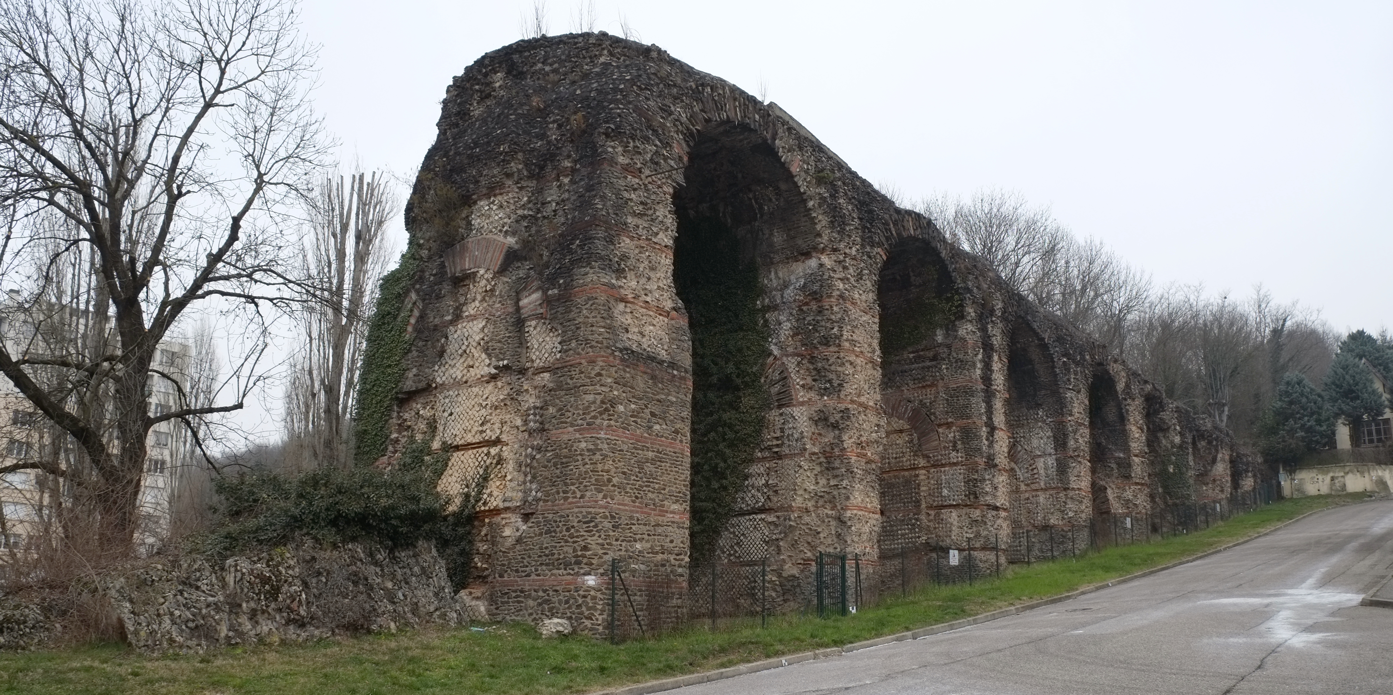 Aquädukt in Sainte-Foy-lès-Lyon